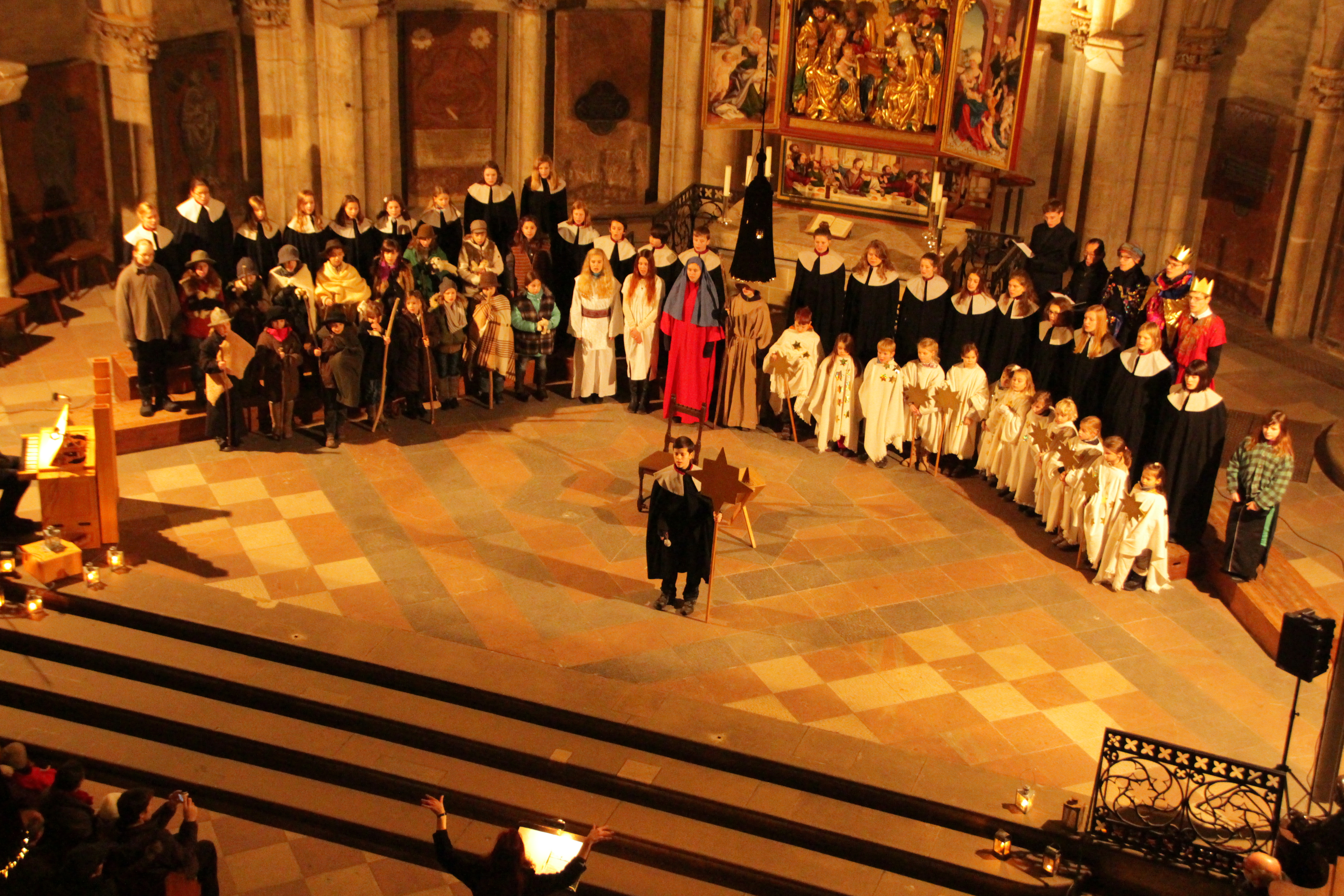 Jedes Jahr am Samstag vor dem Dritten Advent, seit 1957.